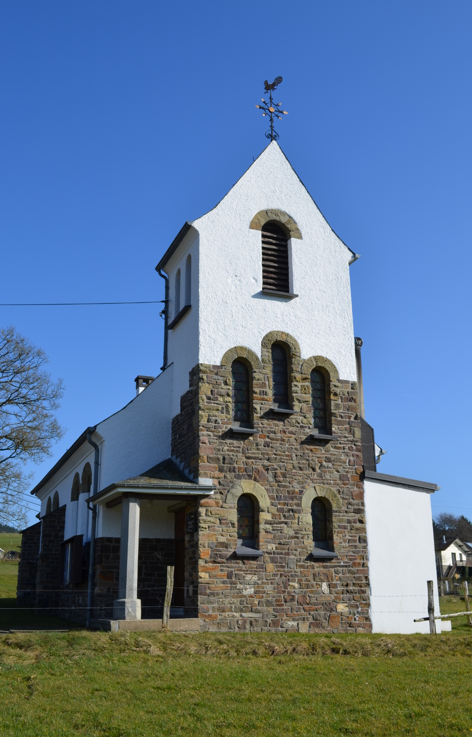 Kapelle in Auel, Burg-Reuland